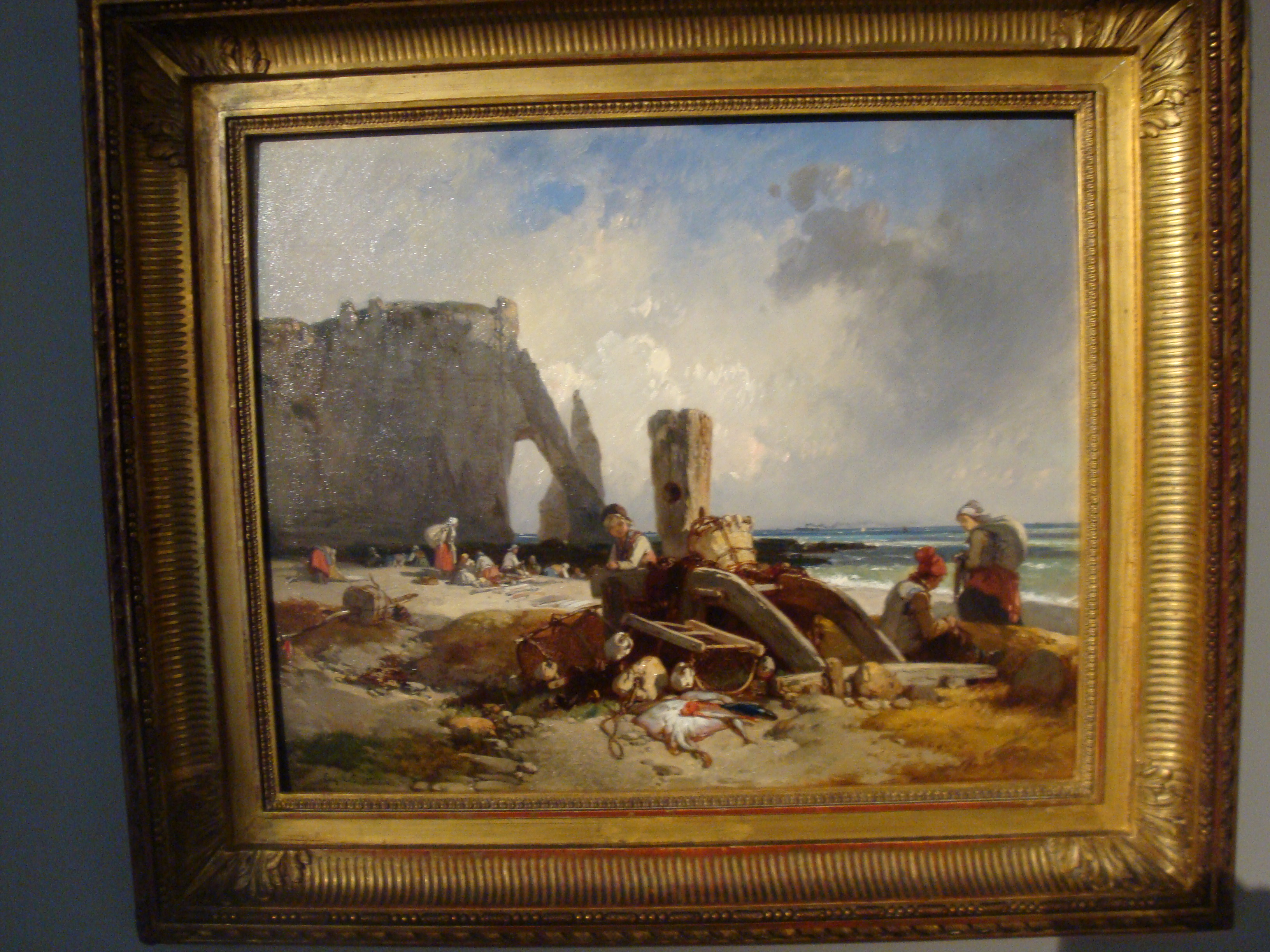 Etretat et familles de Pêcheurs Eugène Lepoittevin